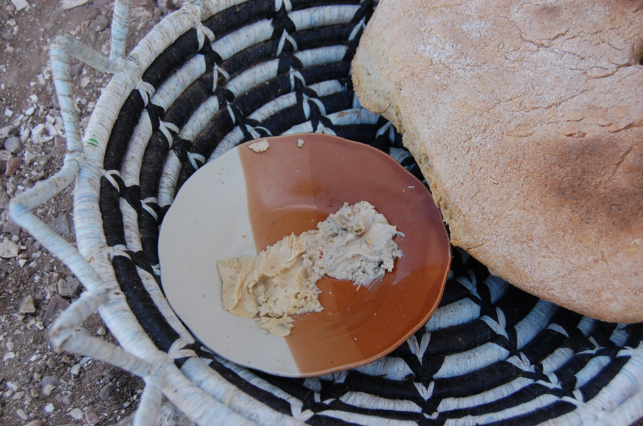 Walon: سمن (seur boure salé)